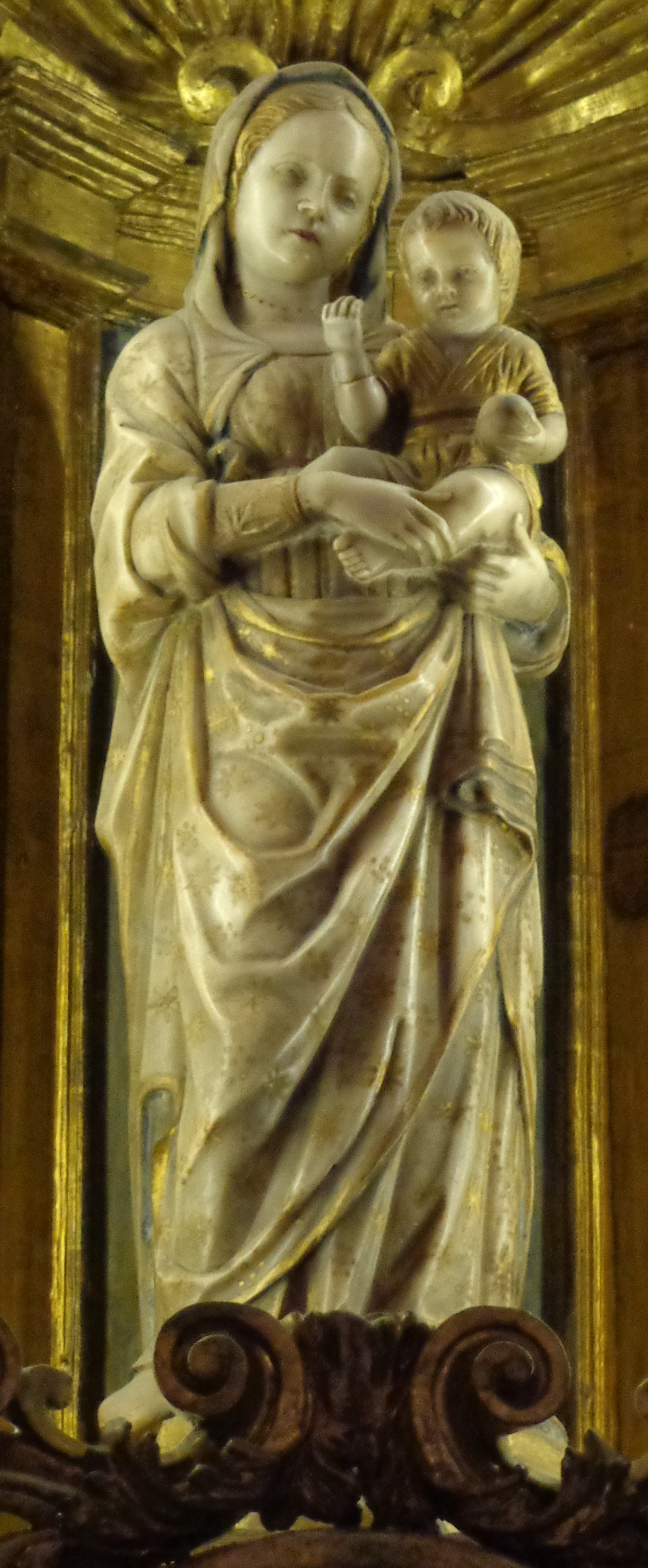 Madonna con Bambino Gagini Milazzo dettaglio